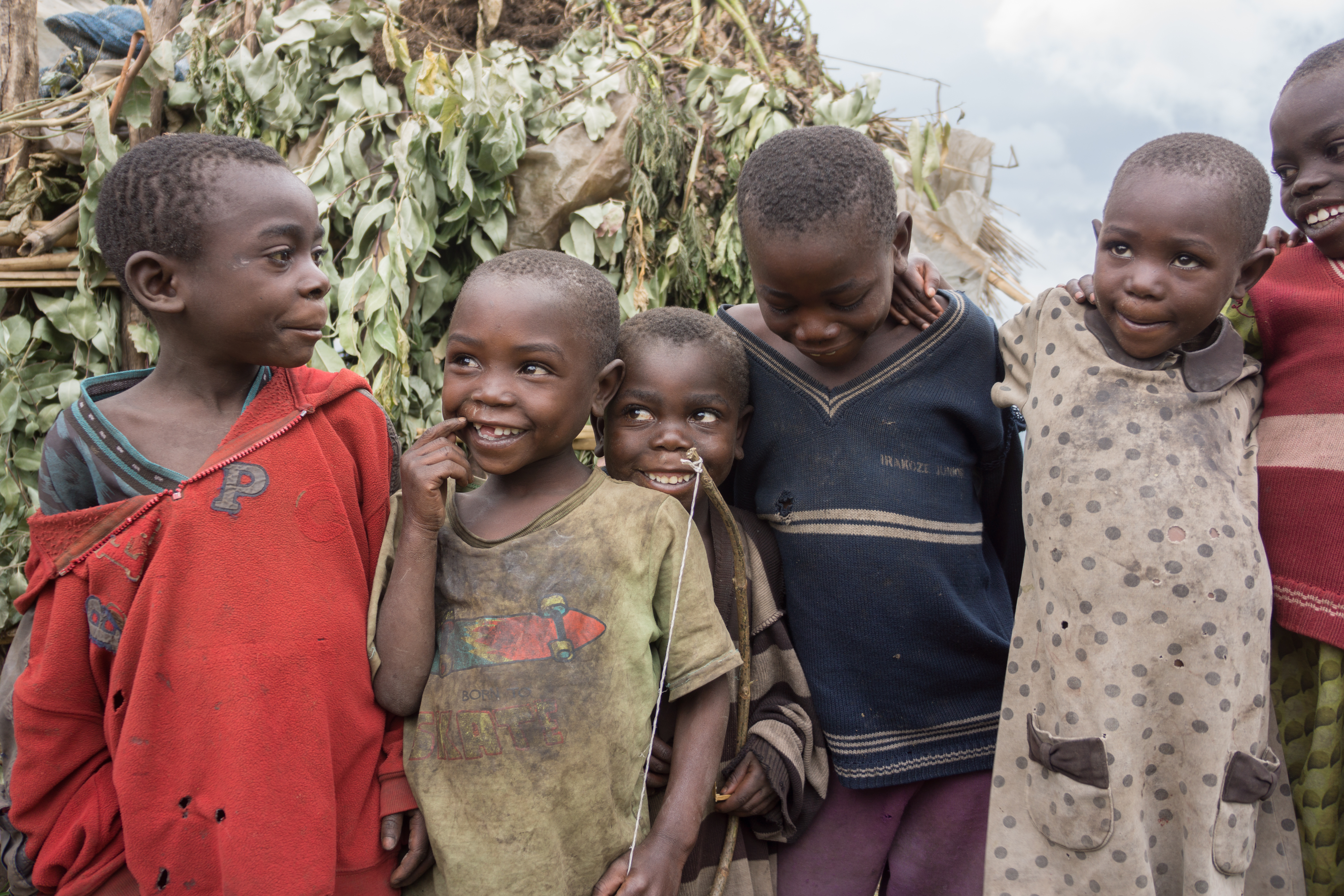 Kisoro, Uganda